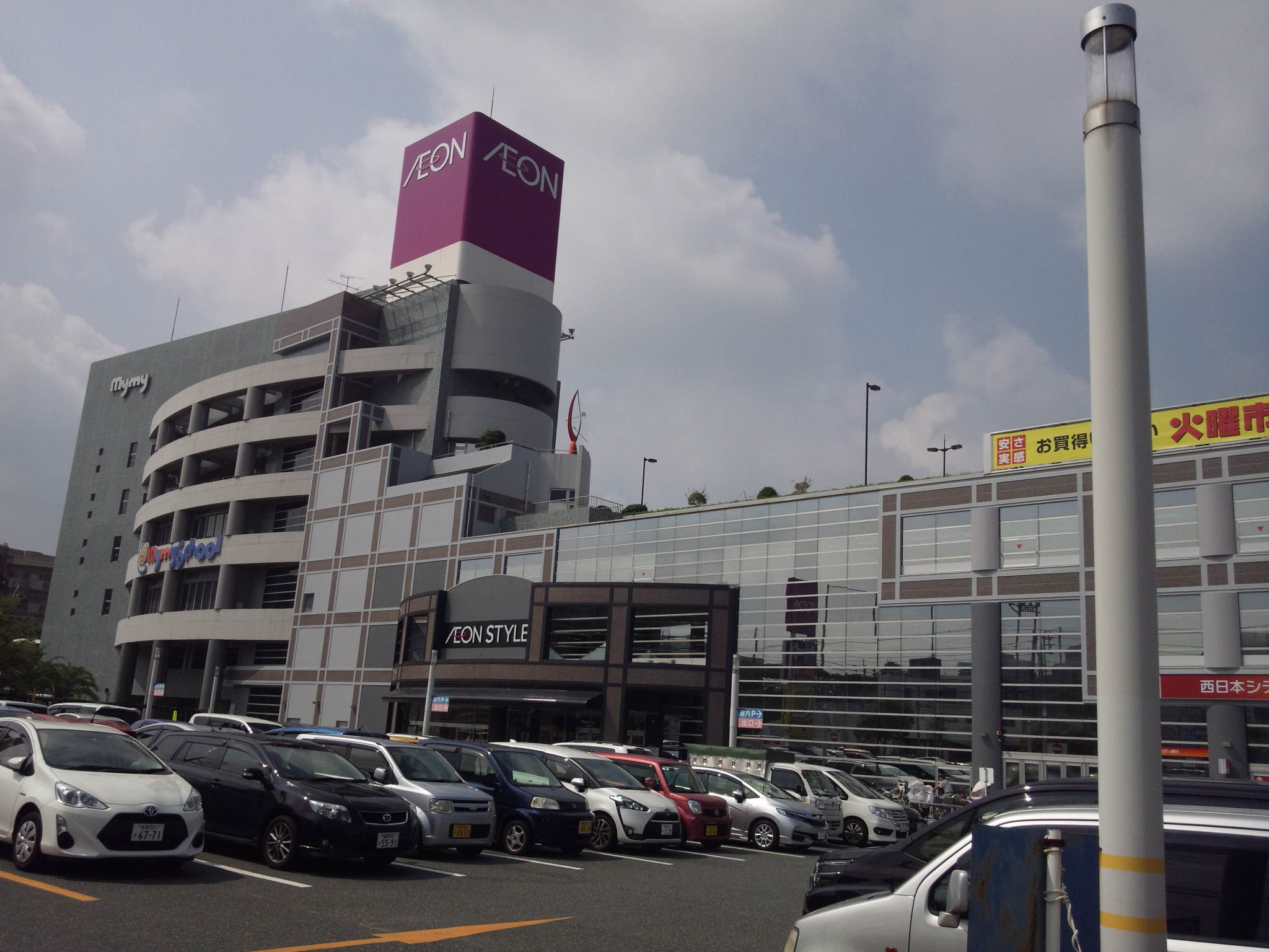 イオンスタイル笹丘・店舗外観（油山観光道路側） （福岡市中央区）